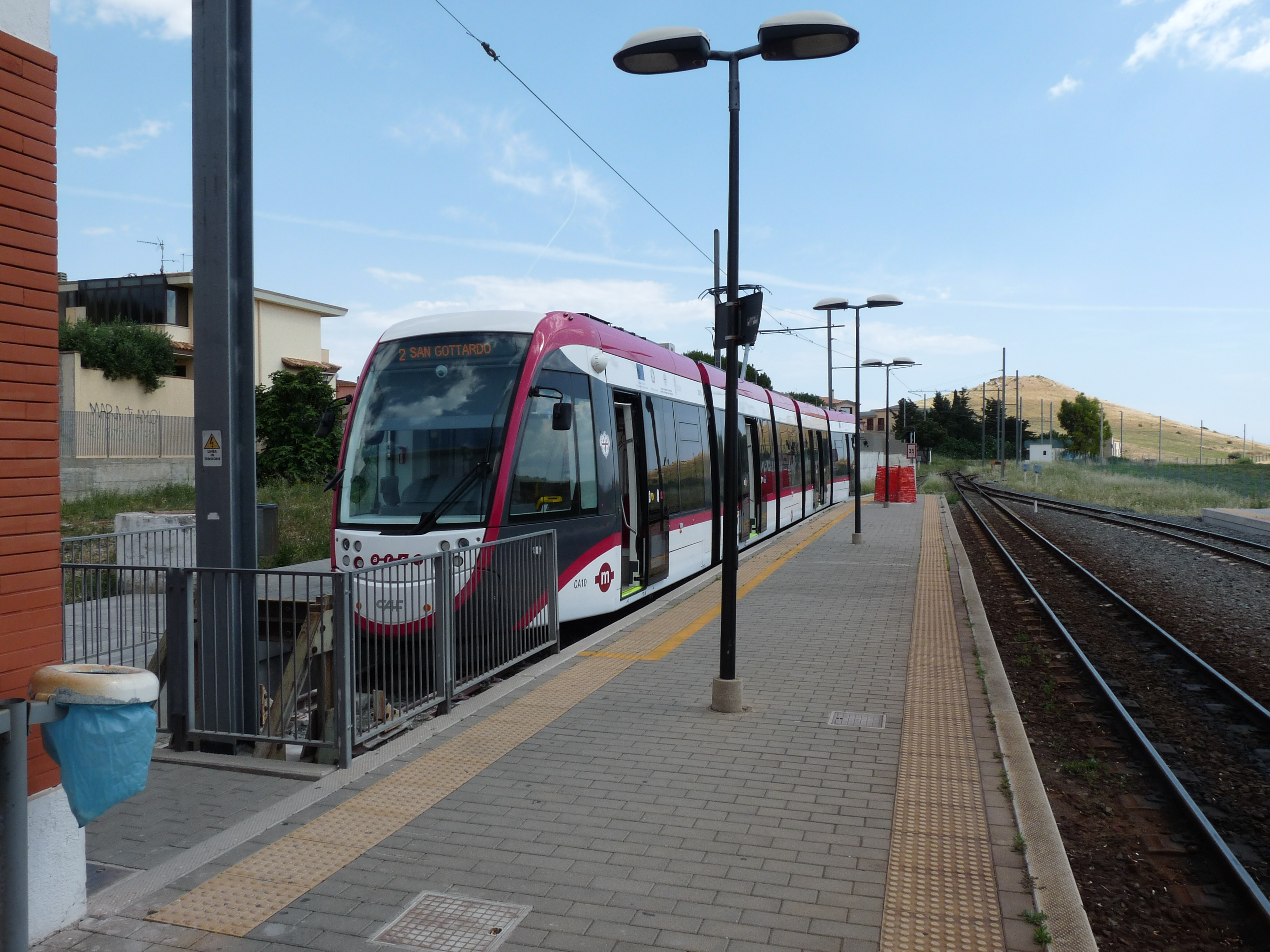 Het eindpunt van tramlijn 2 in Settimo San Pietro